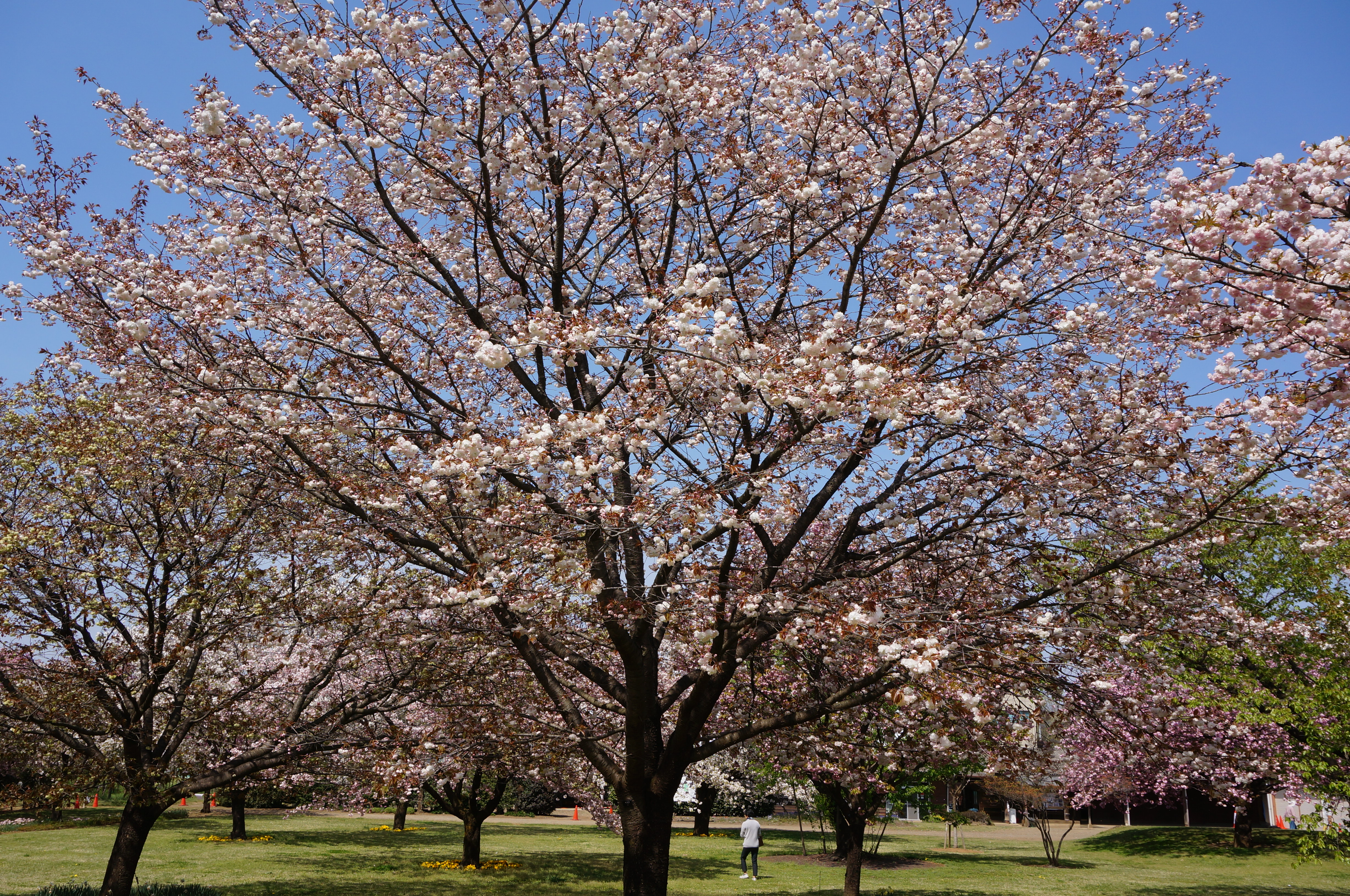 日本花の会結城農場さくら見本園にて